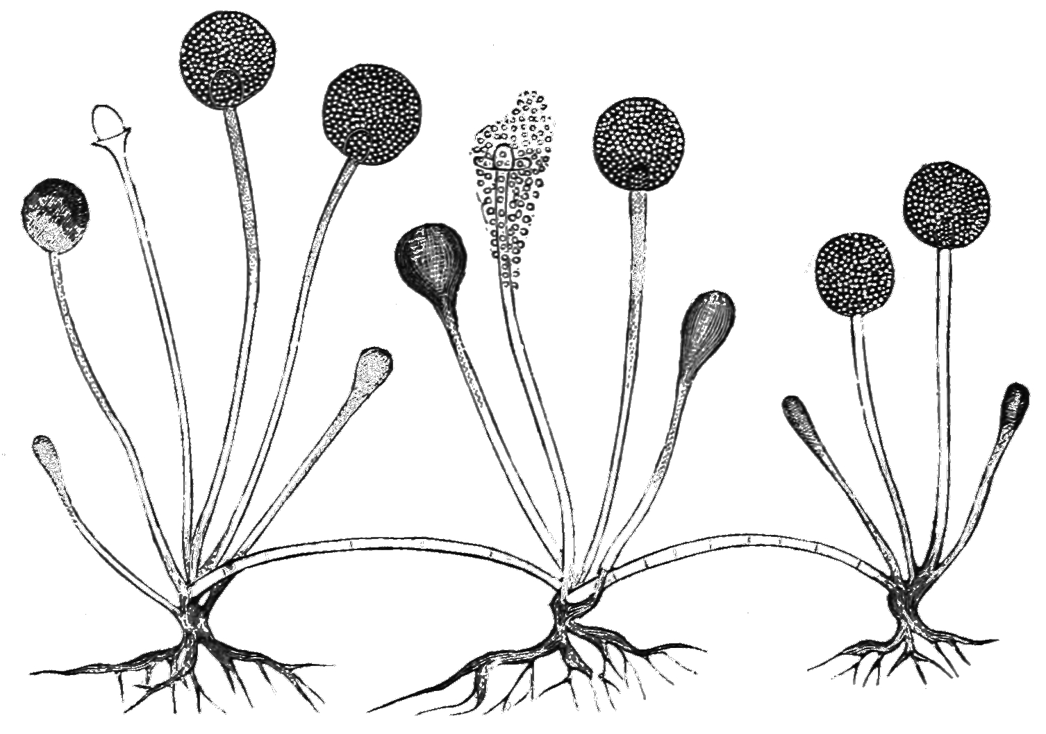 Plant spores